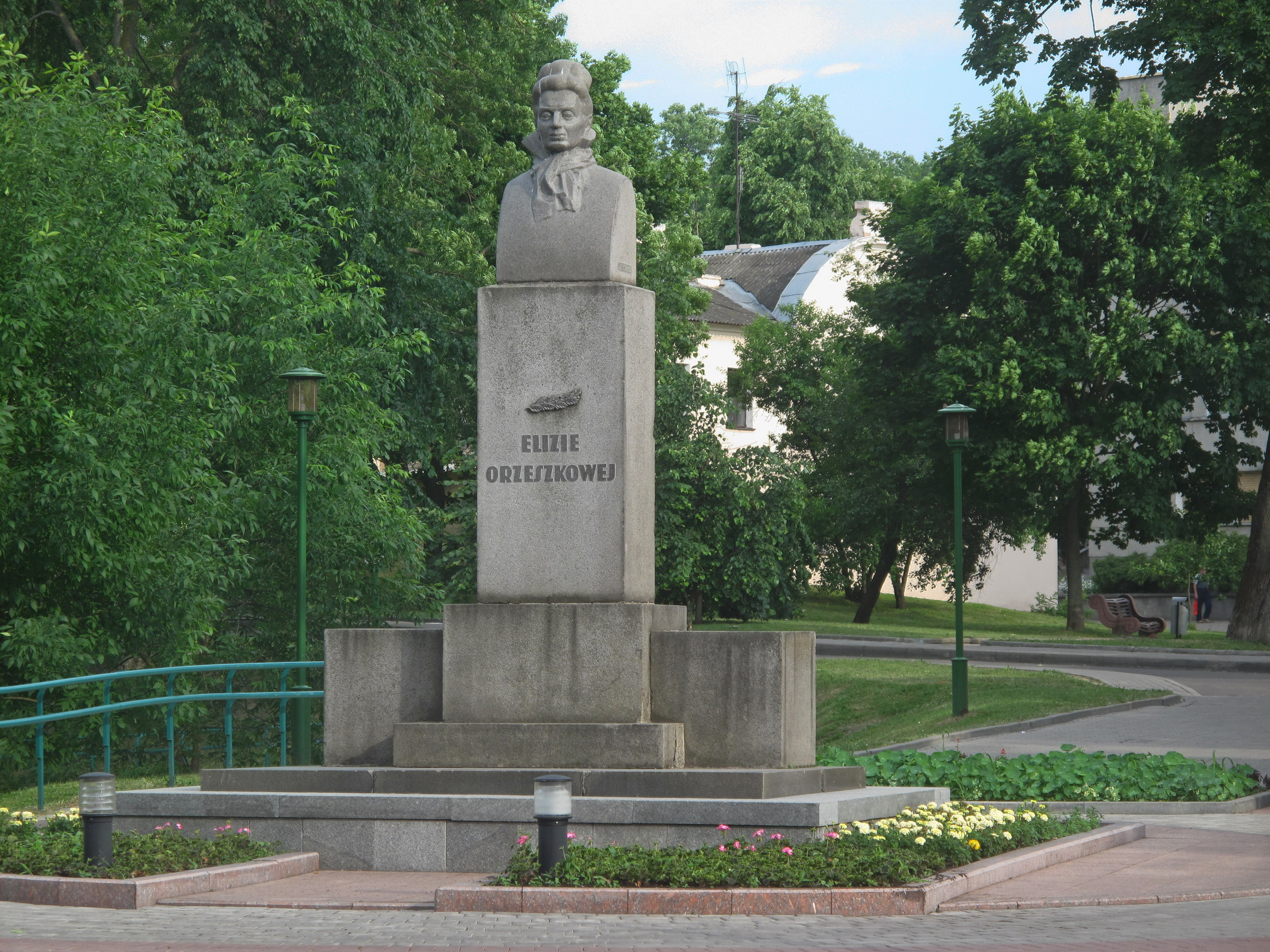 Беларуская (тарашкевіца): Памятник Э Ожешко